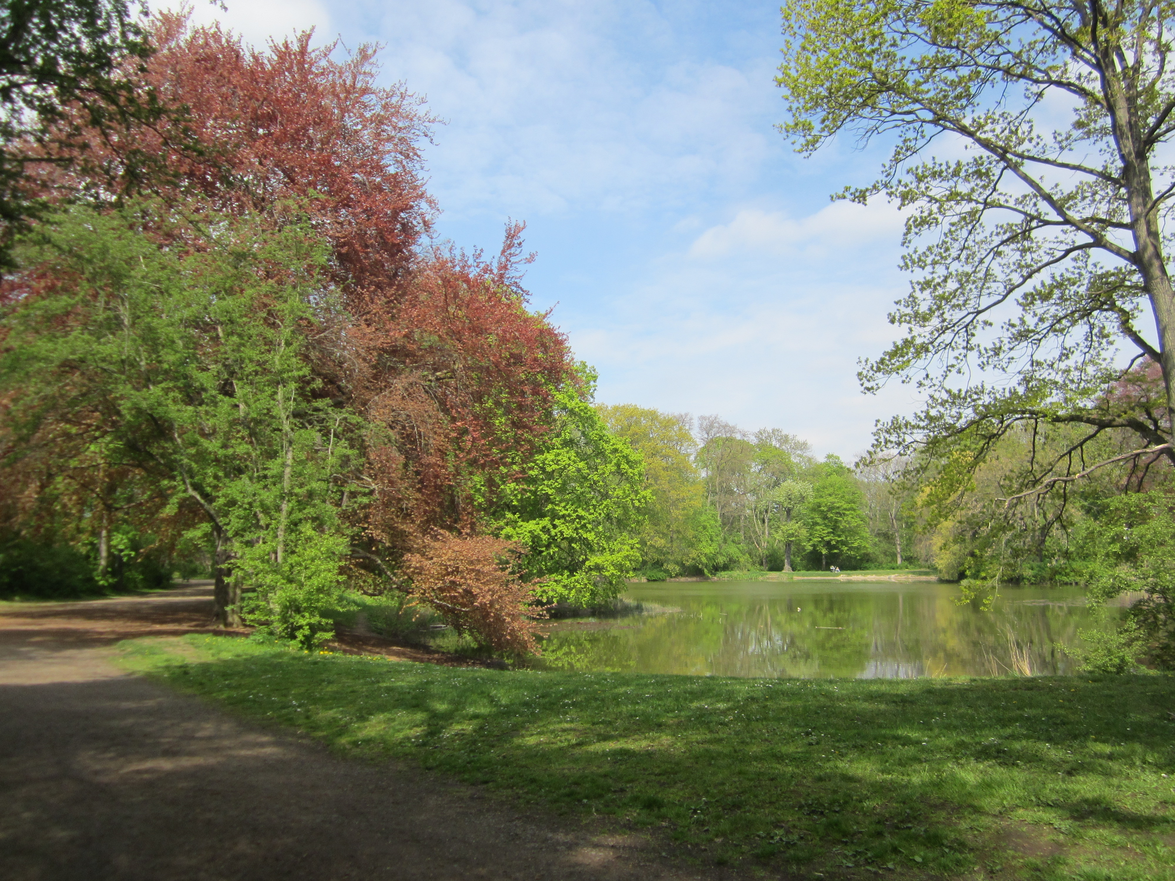 Teich im Stünzer Park von Osten; LSG l 25 Östliche Rietzschke - Stünz